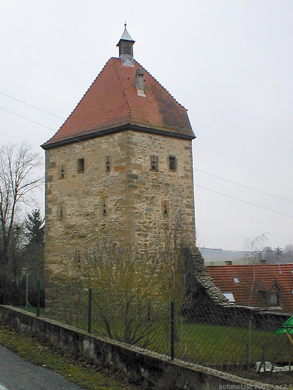 Fünfeckiger Hoher in Neckarbischofsheim, erbaut 1448, mit Dach und Rückwand versehen im 18. Jhd., hier die der Stadt abgewandte dreieckige Außenseite mit Schießscharten